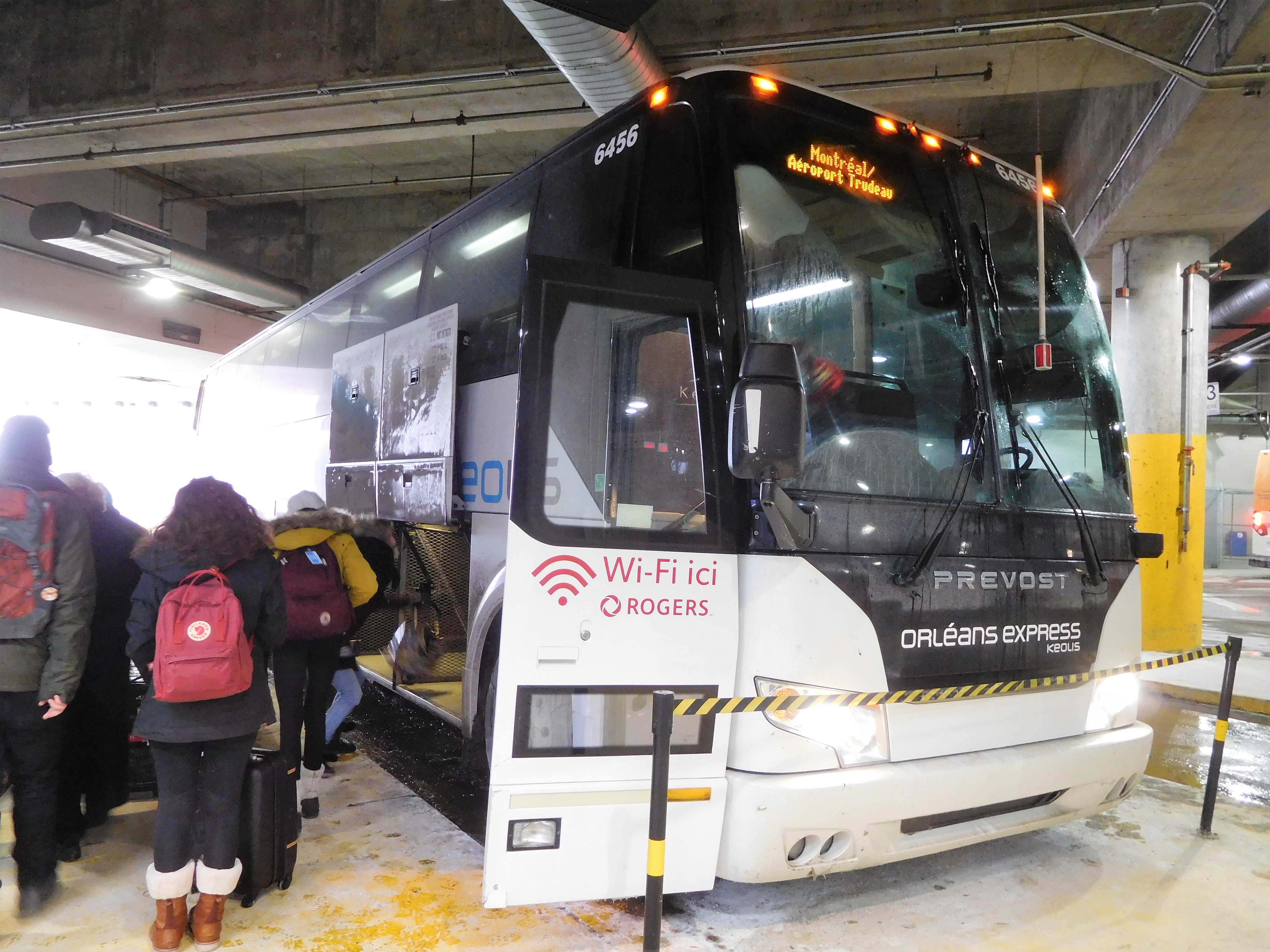 Autocar de la compagnie Orléans Express à la gare d'autocars de Montréal